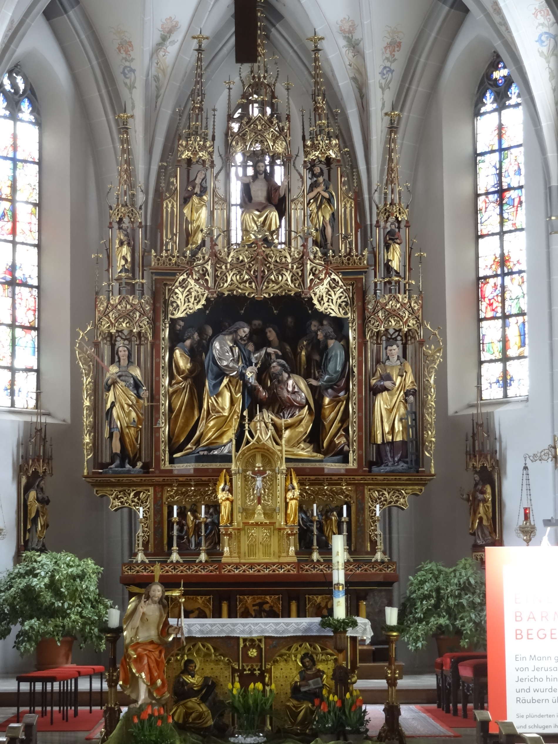 Hochaltar der Pfarrkirche St. Peter in Velden an der Vils (Lkr. Landshut)